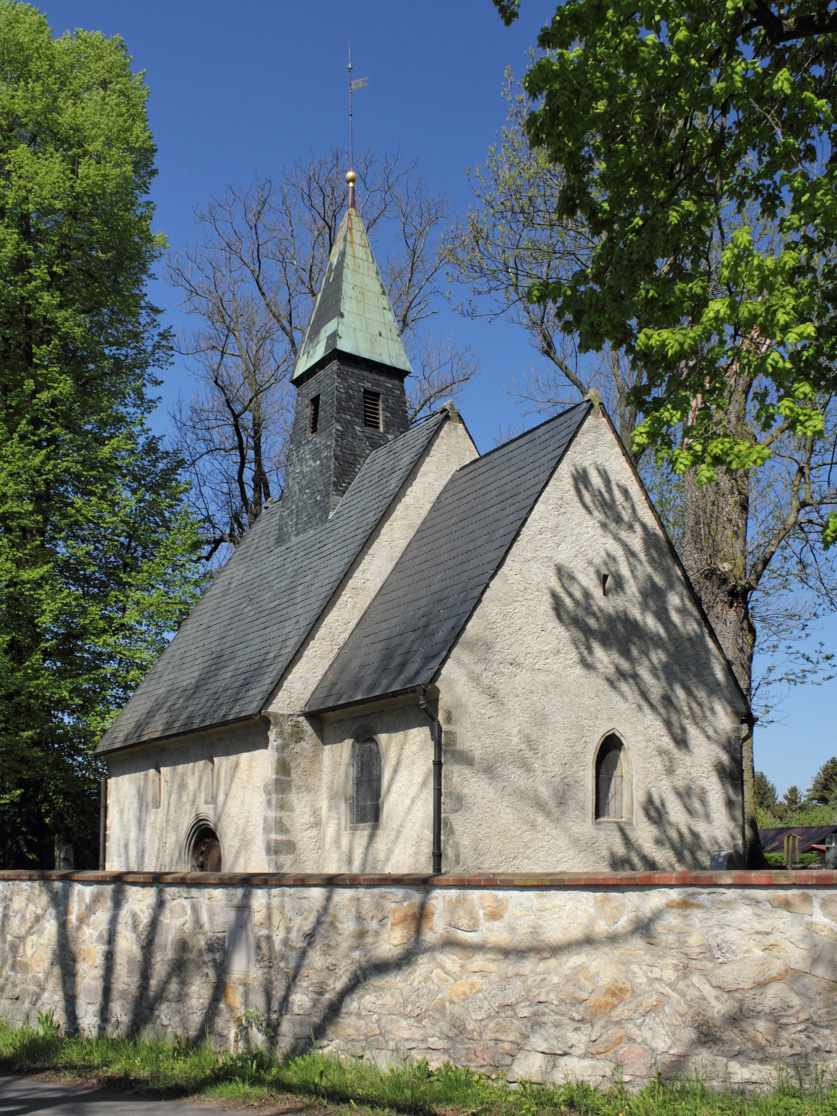 Kostel svatého Jana Křtitele, Turnov-Nudvojovice